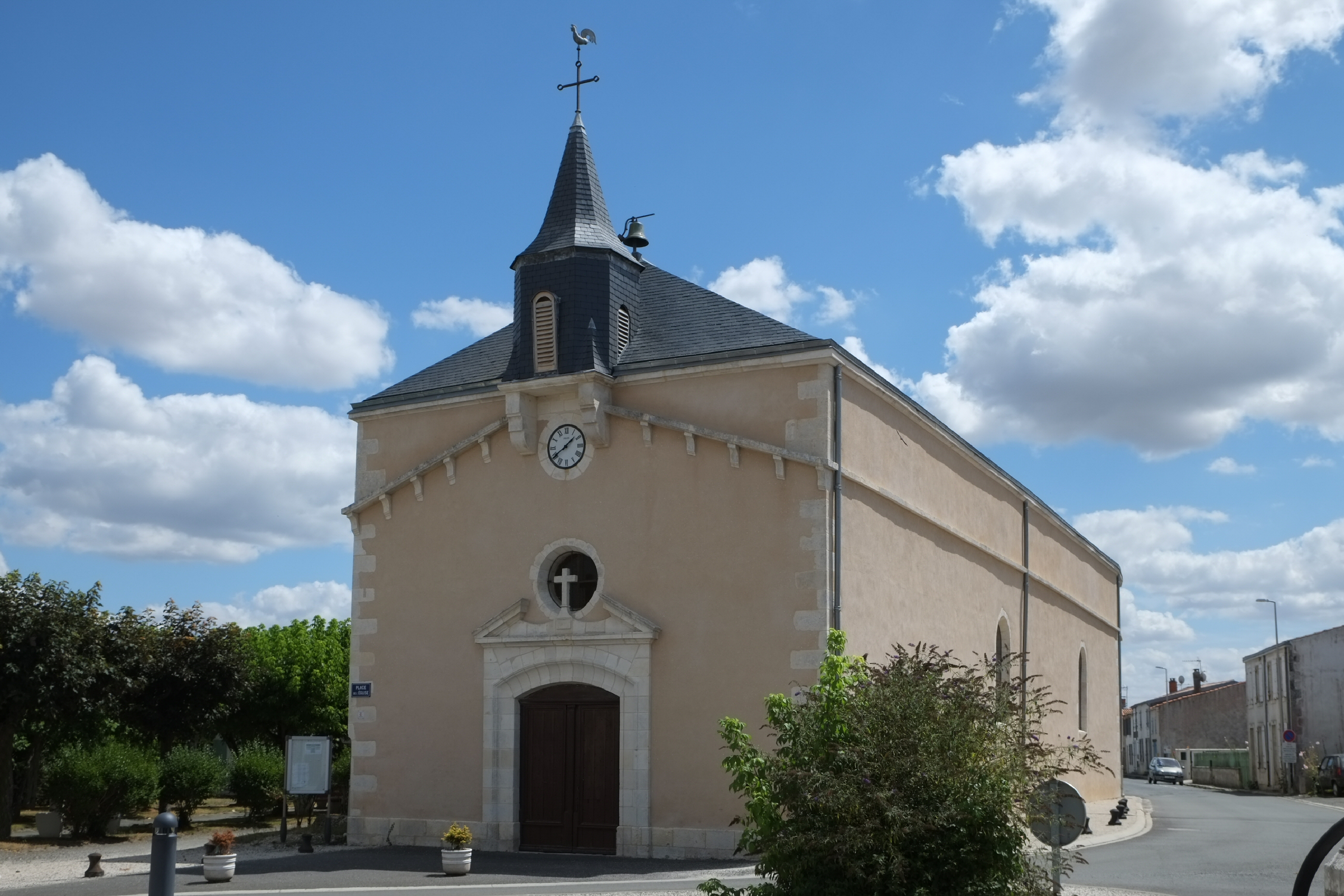 Église Saint-Martin Nuaillé-d'Aunis Charente-Maritime France